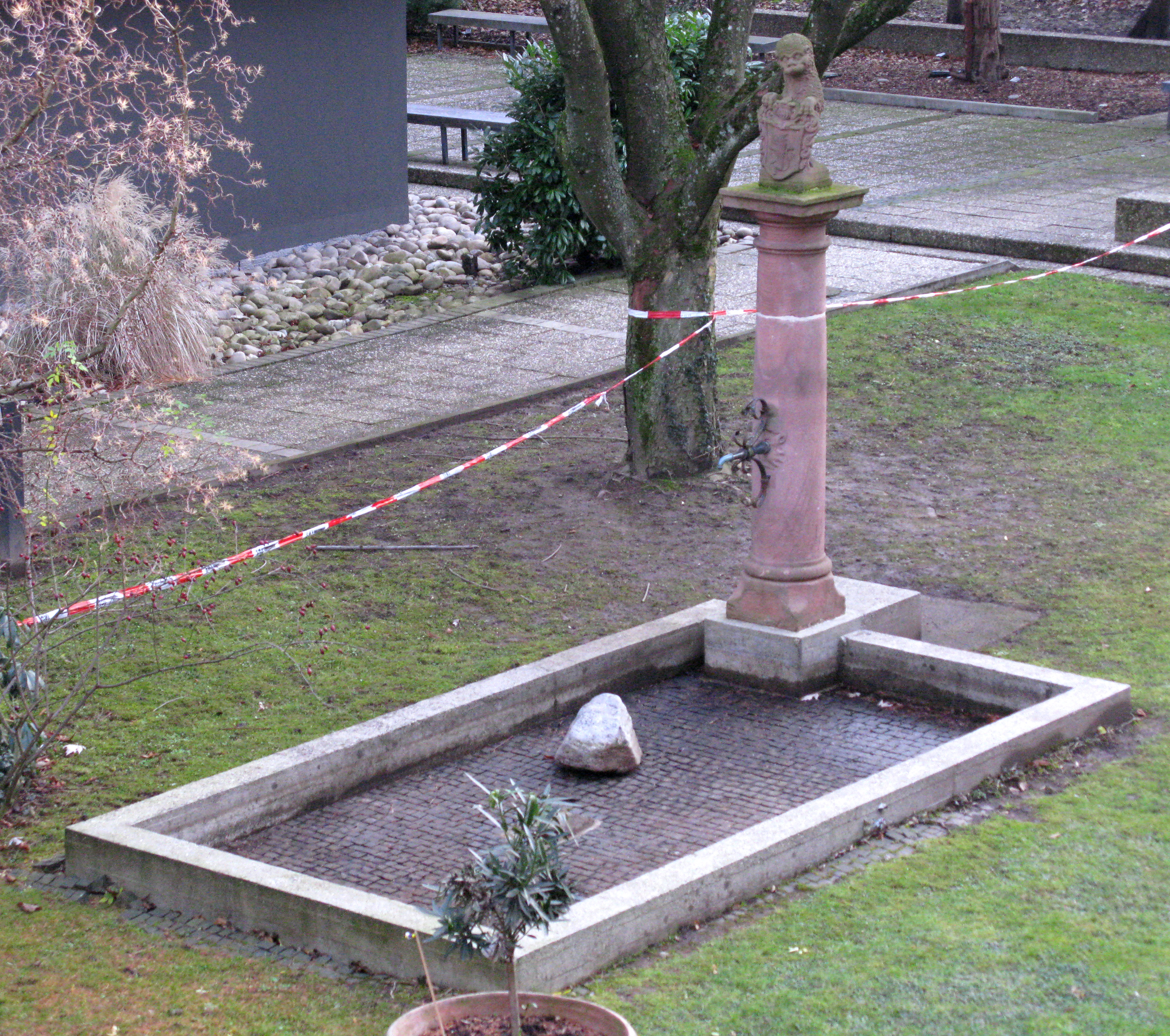 Diese Brunnensäule aus rotem Sandstein mit dem Wappen der Freiherren von Pfirt, stand früher beim Andlauschen Haus in der Herrenstraße in Freiburg. Heute steht sie auf dem Gelände der Fachschule für Sozialpädagogik der Erzdiözese an der Händelstraße in Herdern.